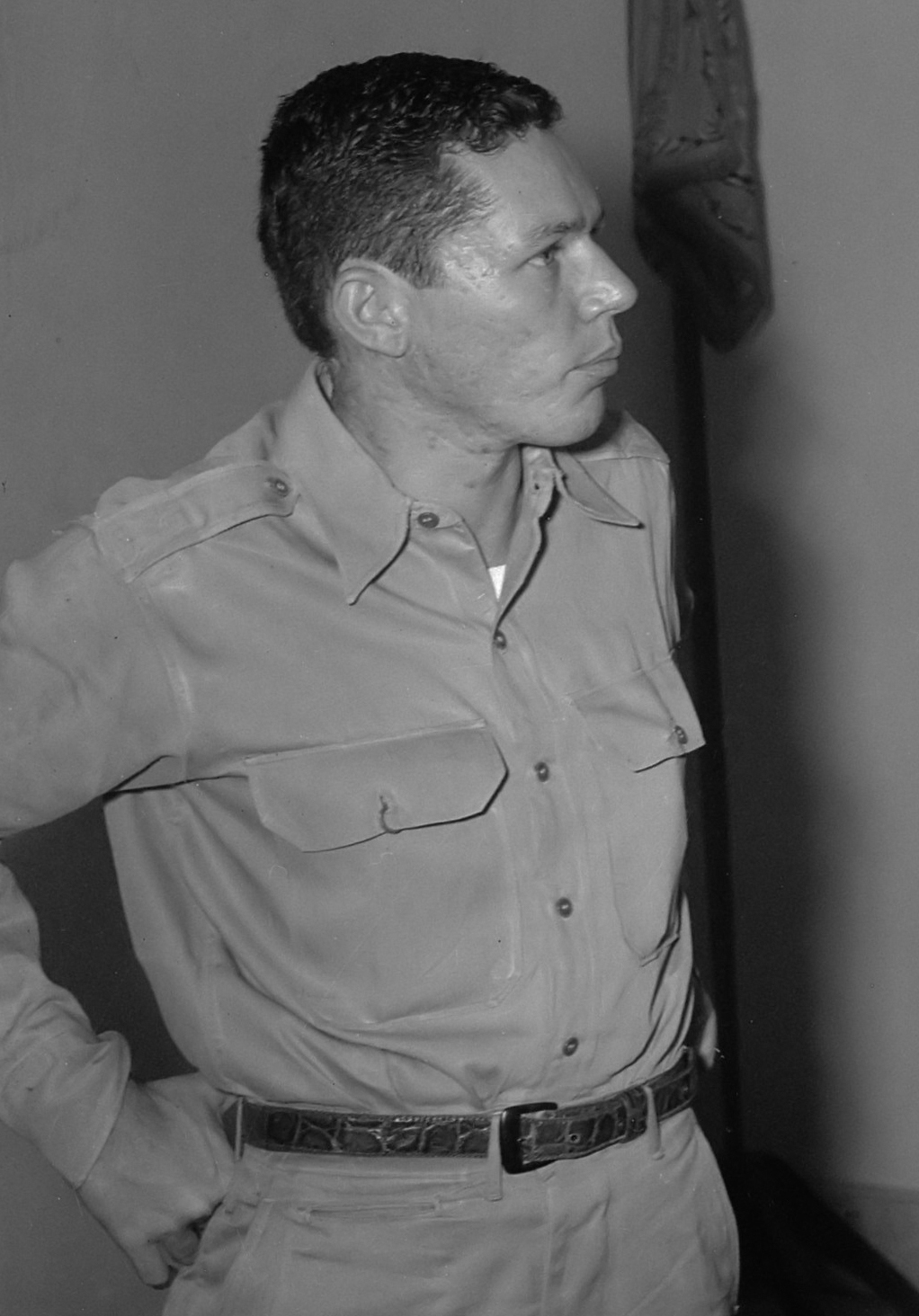 Journalist en correspondent voor United Press, A.C. Brackman (links), op audiëntie bij Generaal D.C. Buurman van Vreeden 1949/10/00